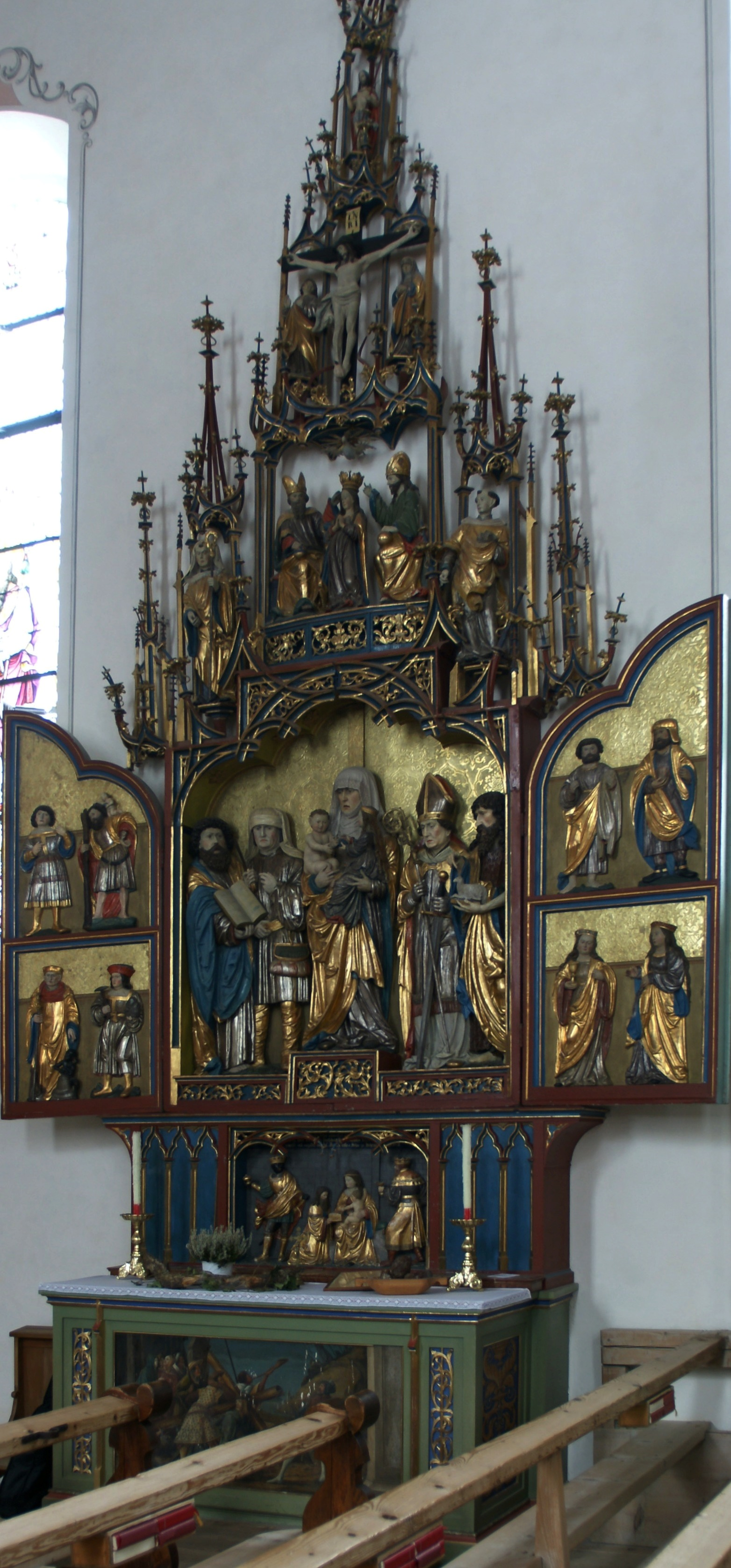 Gotischer Seitenaltar (Knappenaltar) in der Pfarrkirche St. Bartholomäus von Bartholomäberg in Vorarlberg